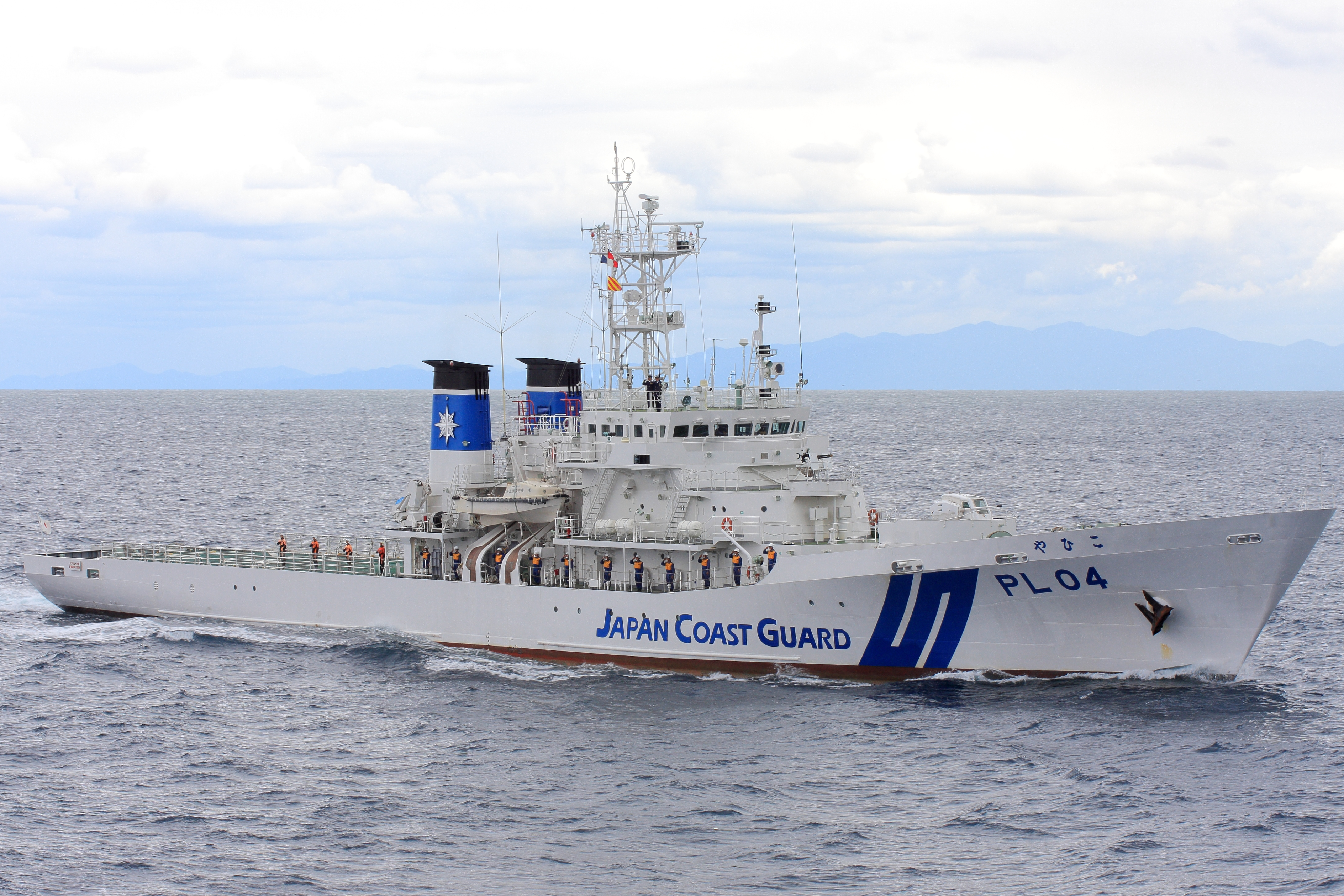 新潟沖で撮影された、海上保安庁第九管区海上保安本部のPL04「やひこ」